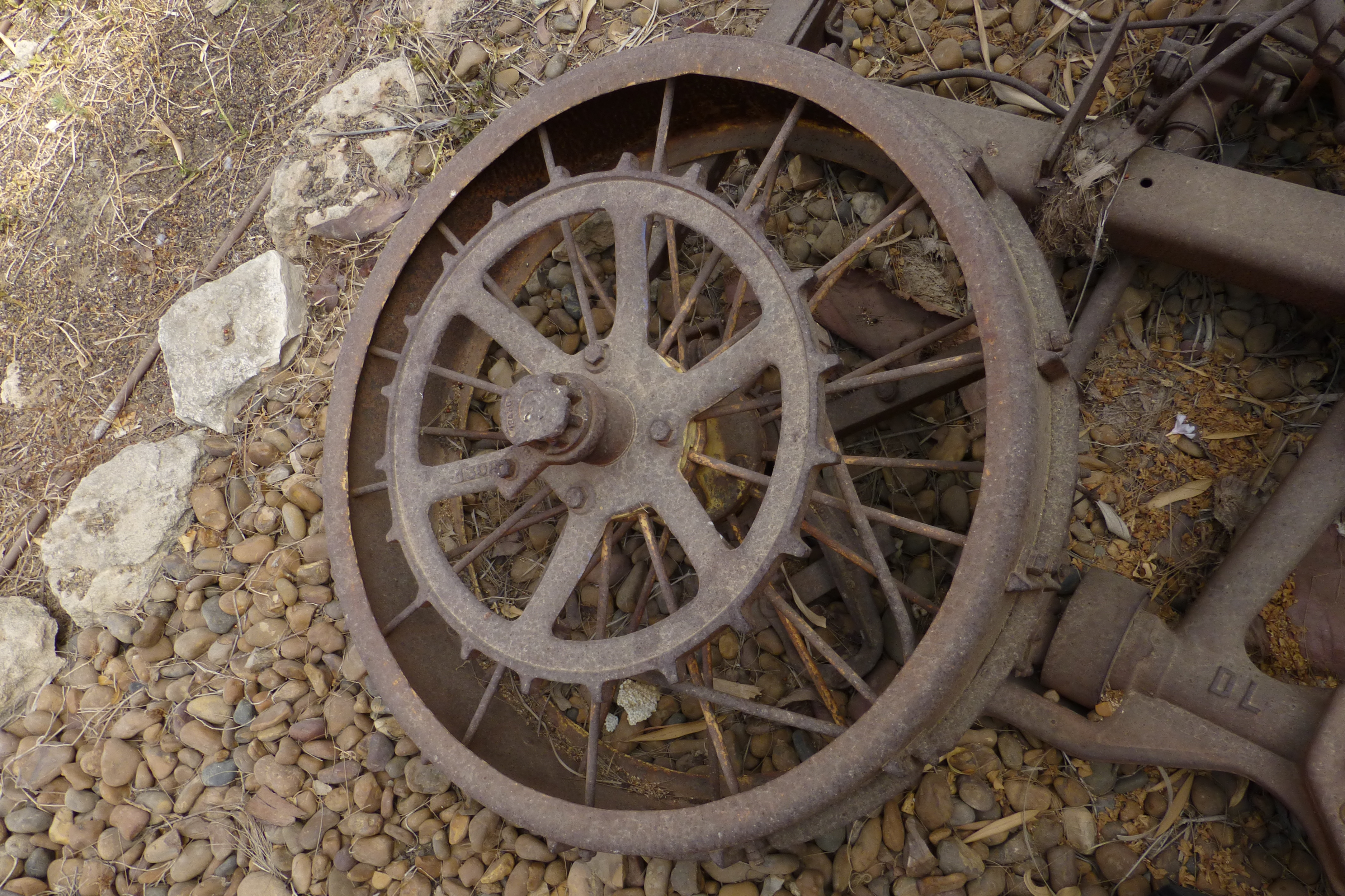 נבנה ב1924, על ידי משה ורחל מינץ. שימש בחלקו המערבי כבית מגורים ובחלקו המזרחי כבית עם. כיום הוא משכנו של מוזיאון לתולדות גדרה והביל"ויים.